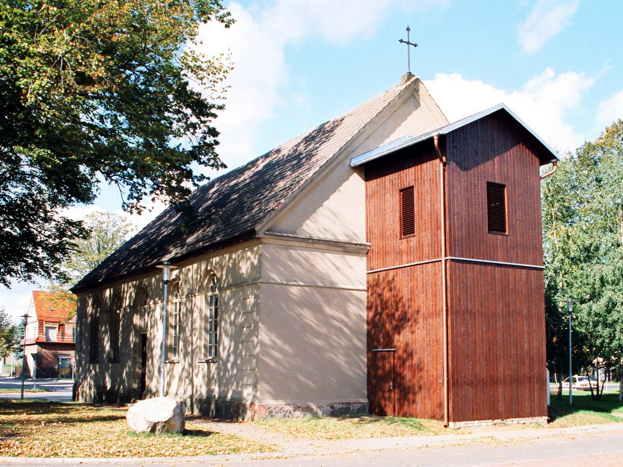 Kirche von Schönwalde (Barnim), Gemeinde Wandlitz, Land Brandenburg, Deutschland